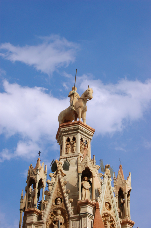 Arca scaligera